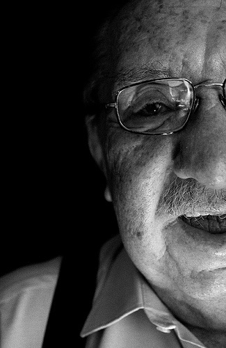 para SoHo